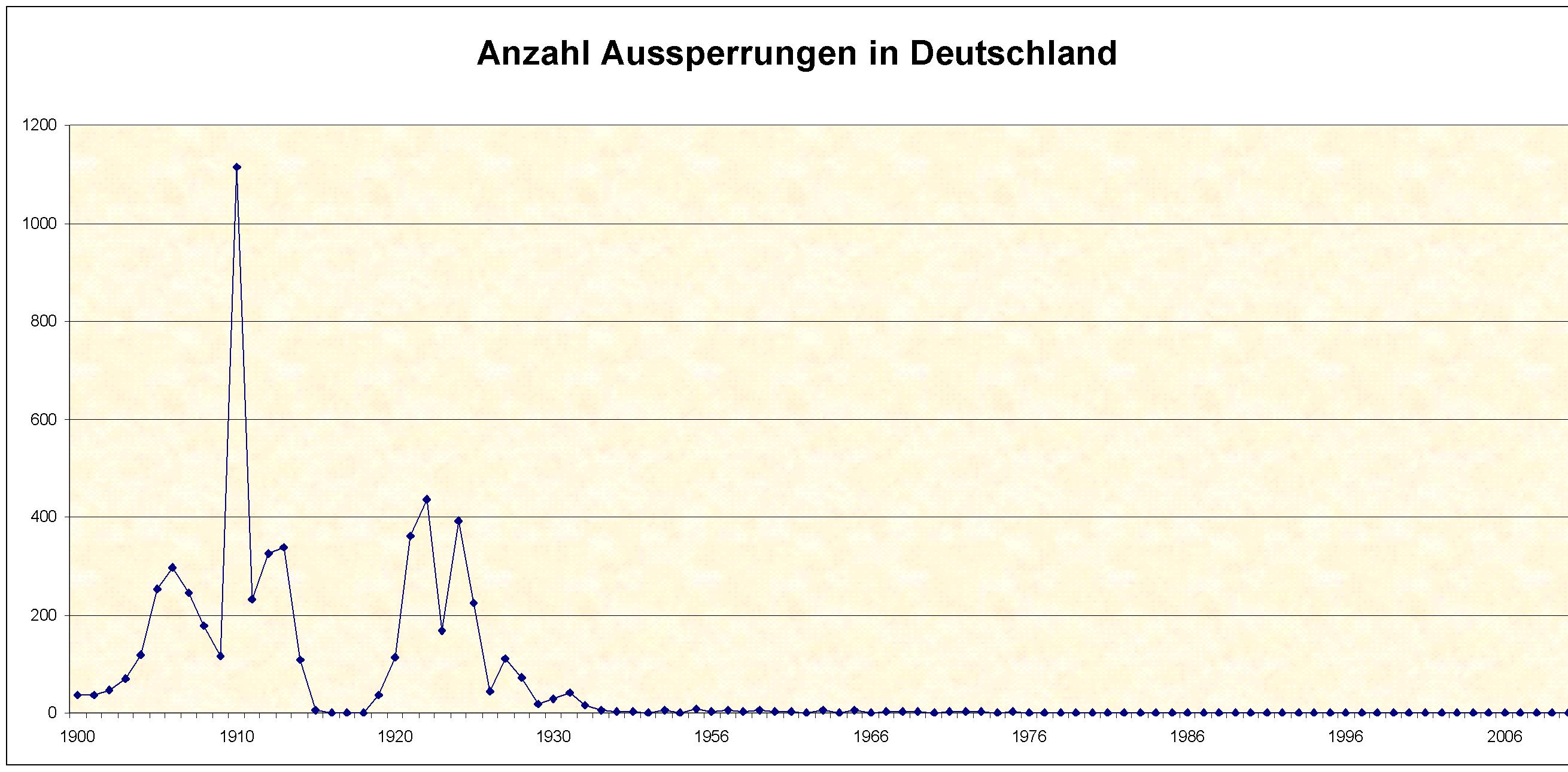 Das Bild zeigt eine graphische Darstellung der Anzahl der Aussperrungen in Deutschland 1900 bis 2009. Quellen sind für die Zeit 1900 bis 1976 Michael Schneider: Aussperrung: ihre Geschichte und Funktion vom Kaiserreich bis heute, 1980, ISBN 3-7663-0414-3, Seite 22-23 und für die Zeit 1971 bis 2009 die Hans-Böckler-Stiftung online